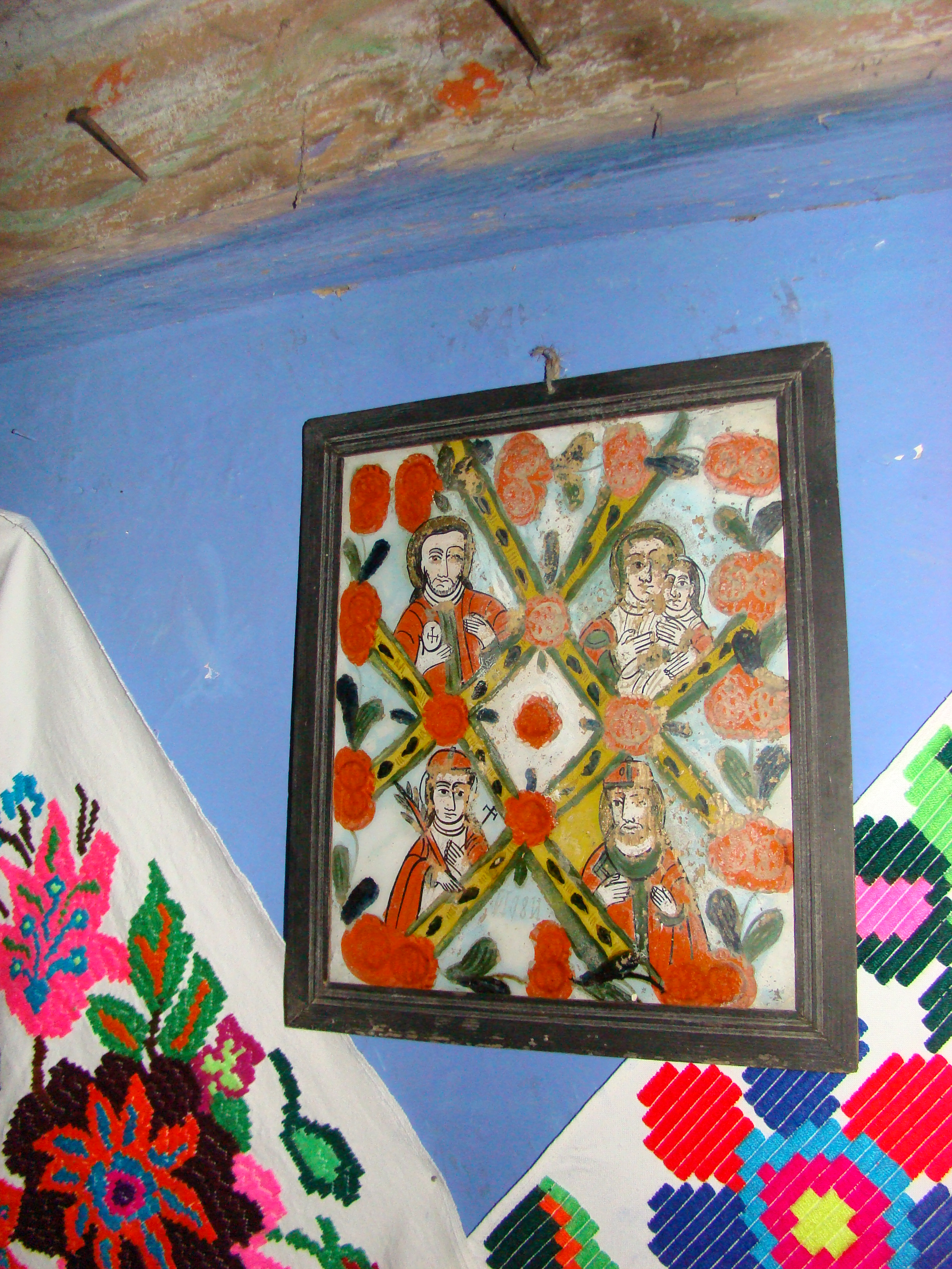 Biserica de lemn "Sfinții Împăraţi" din Aspra